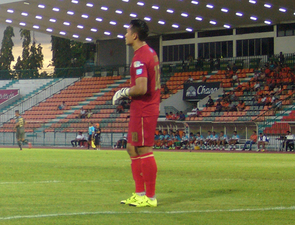 Hassan Sunny